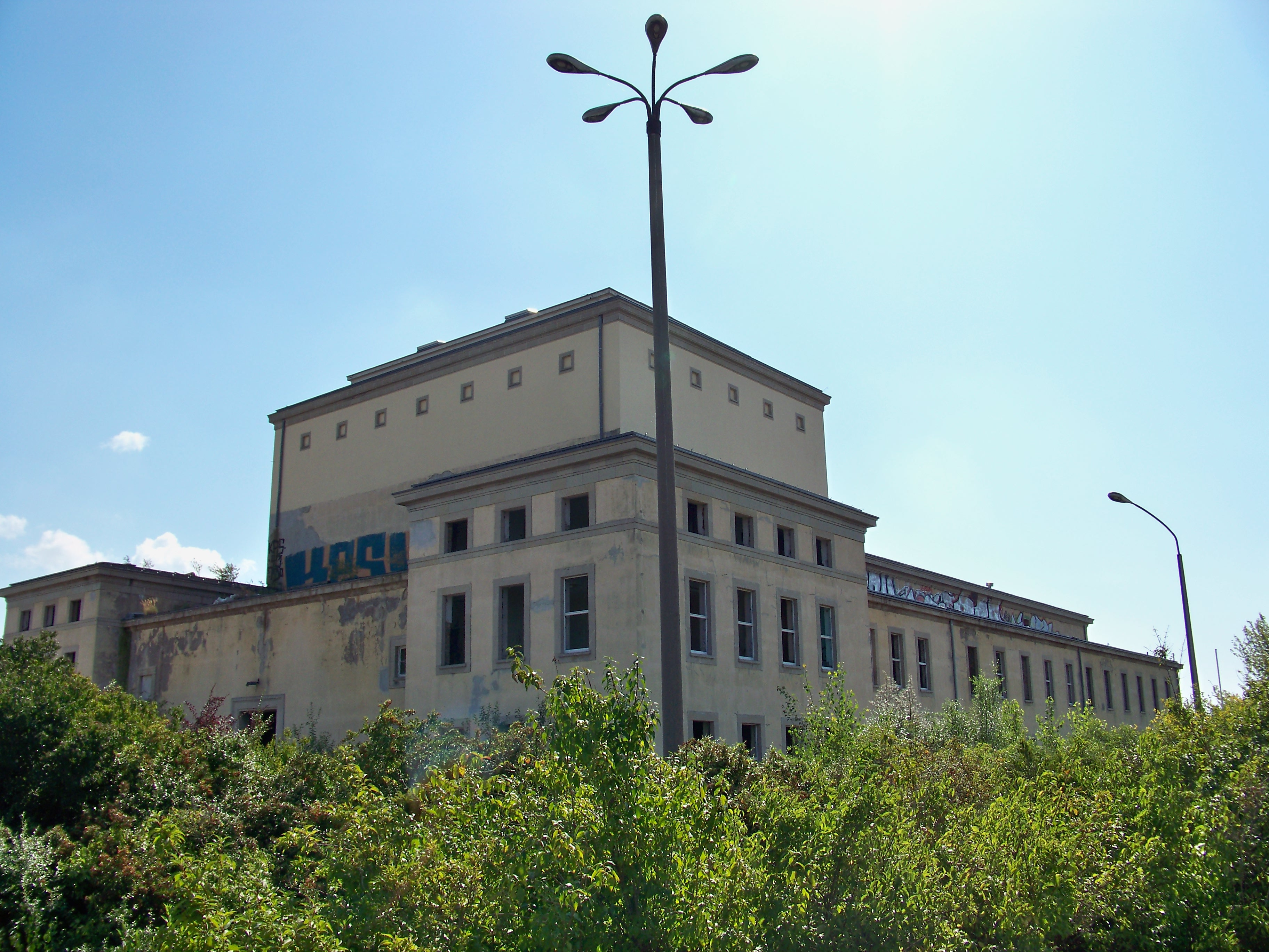 Verfallendes Buna-Klubhaus in Schkopau